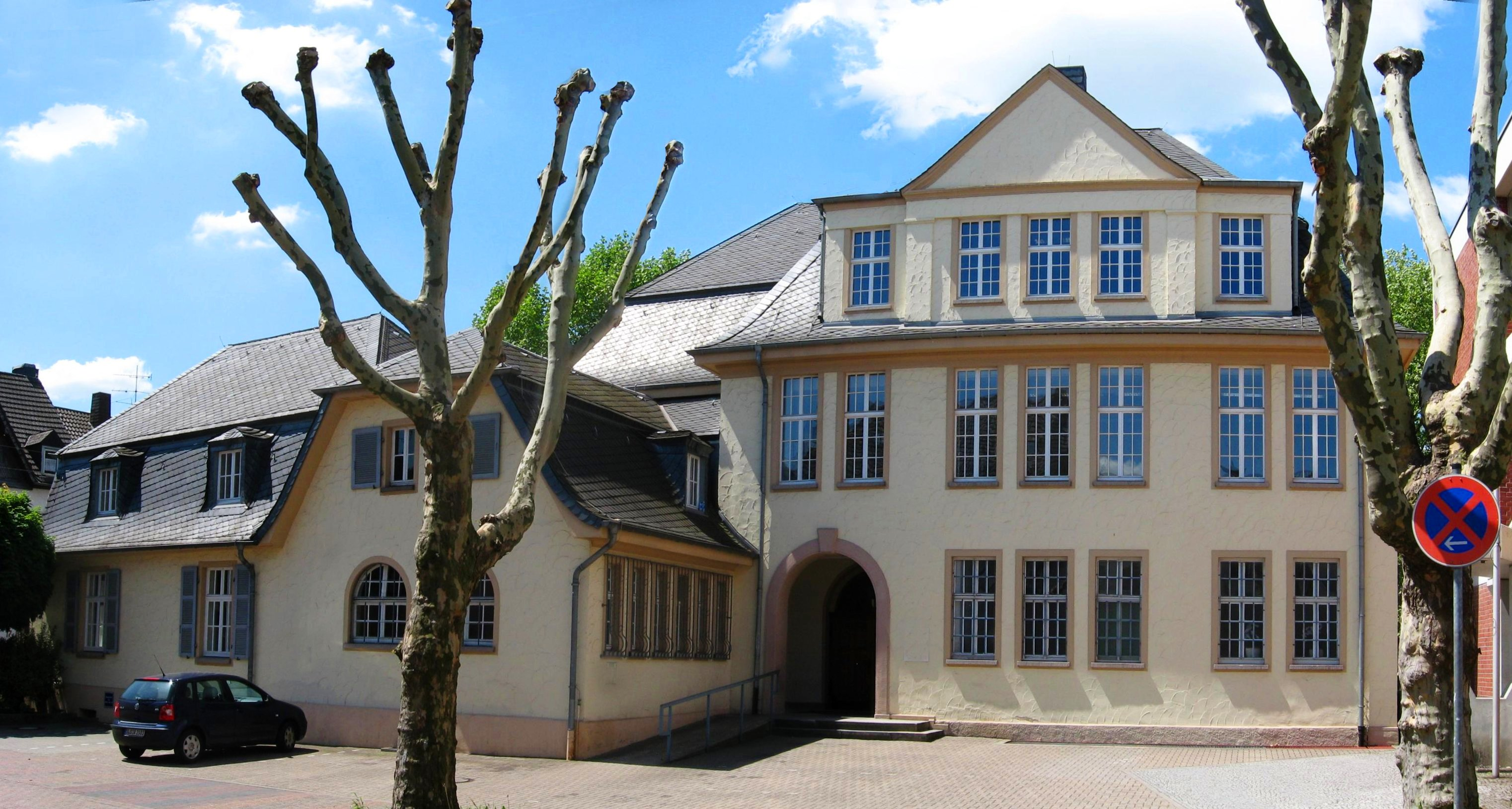 Evangelische Schule in Dillingen